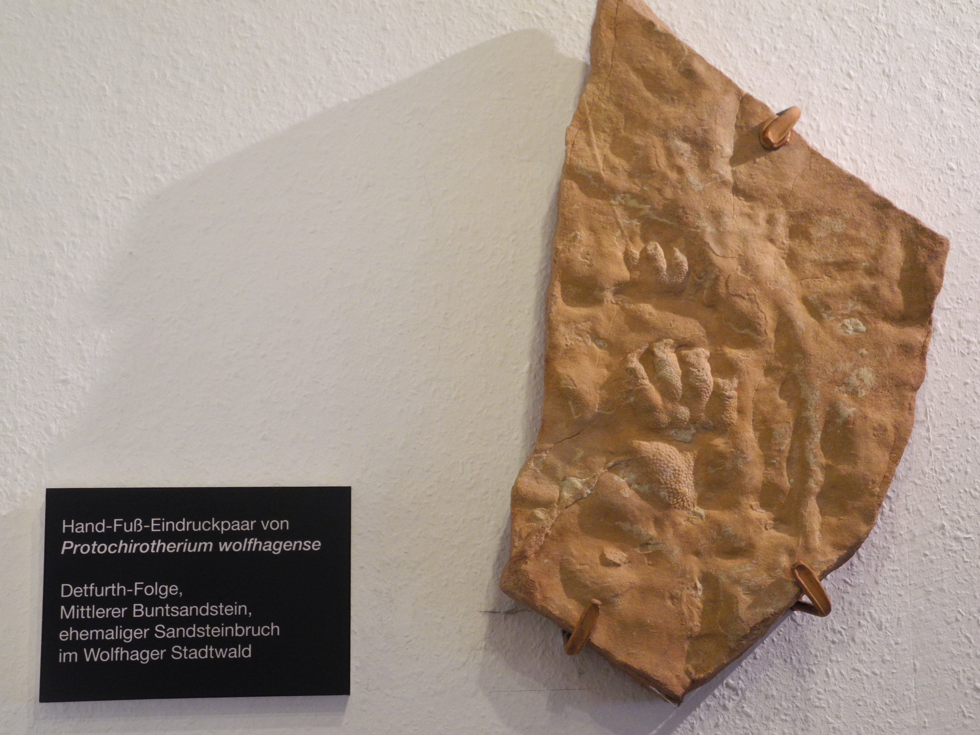 Hand-Fuß-Eindruckpaar von Protochirotherium wolfhagense im Regionalmuseum von Wolfhagen.